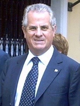 Claudio Scajola in Cogoleto (Genoa)